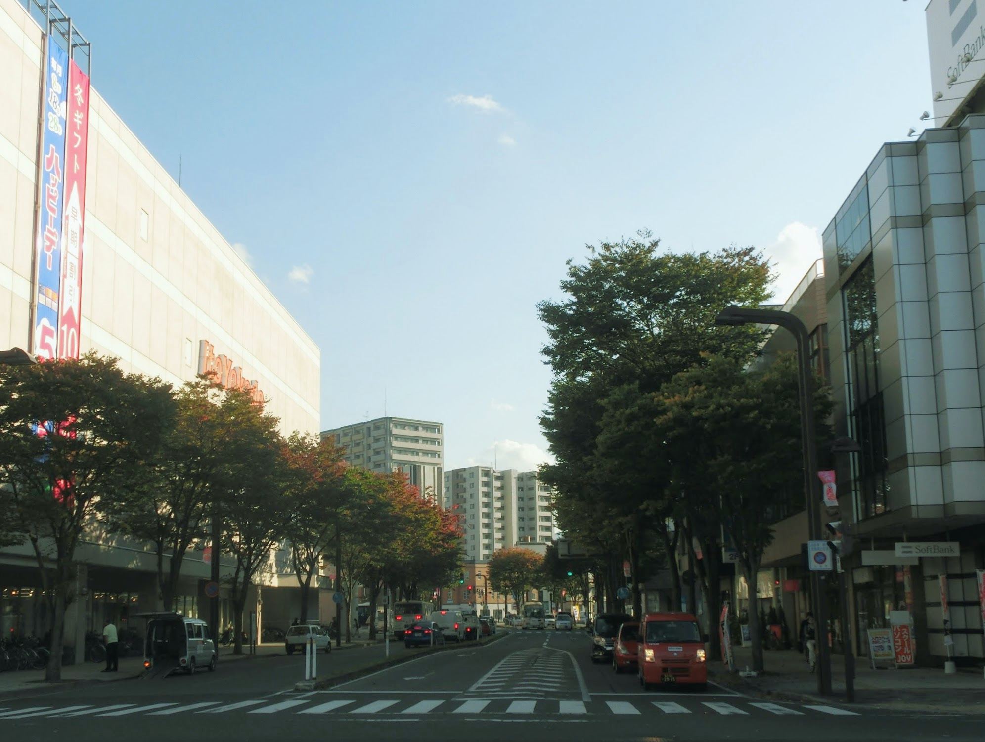 青森県弘前市大字駅前にある「並木通り」の様子。